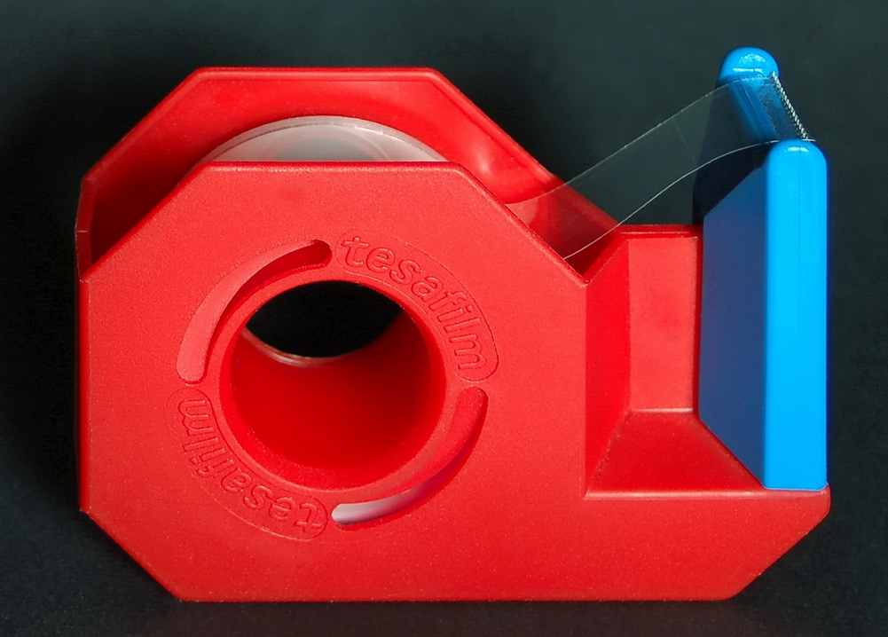 Tesafilmabroller